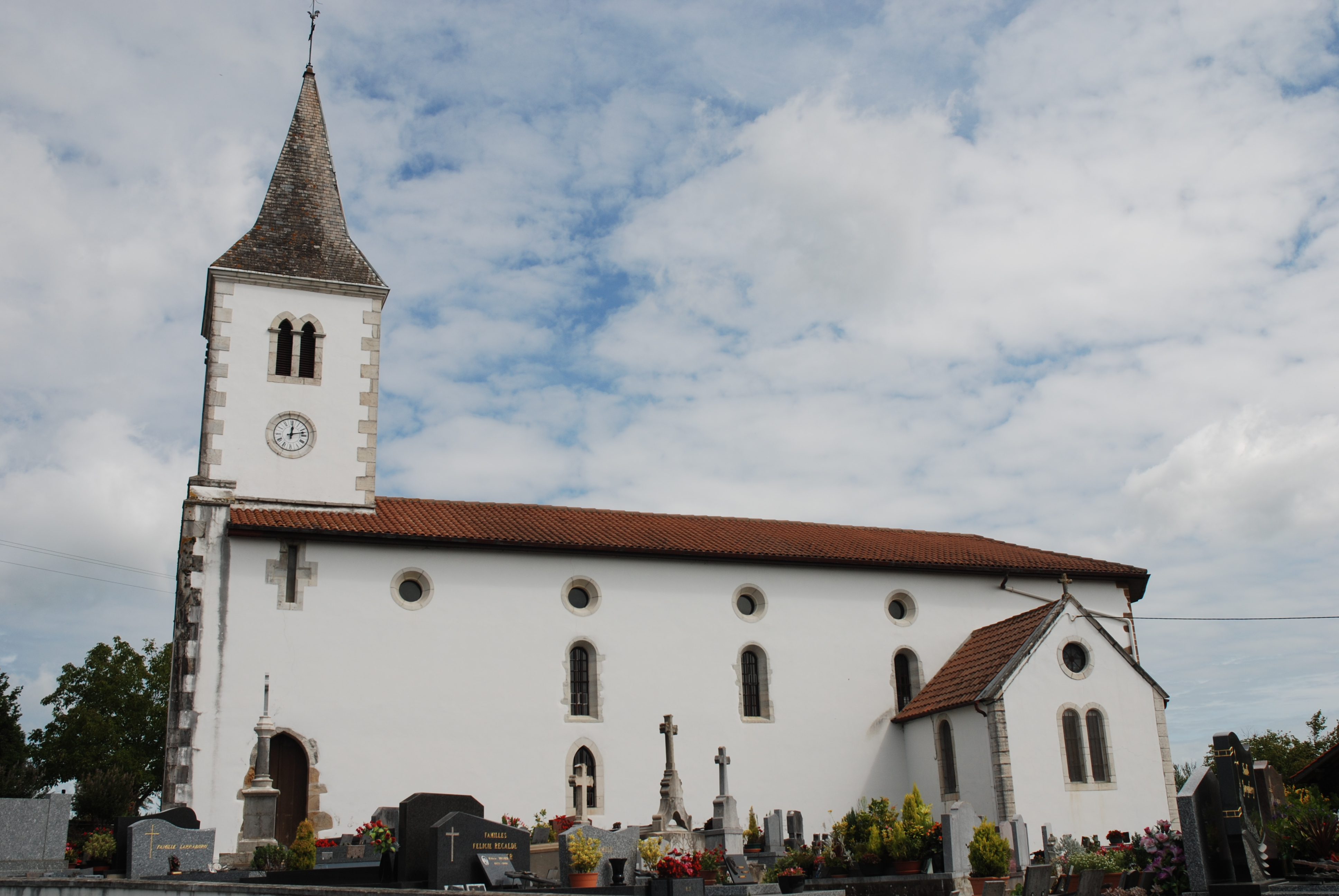 Arraute-Charrite, l'église Saint-Pierre